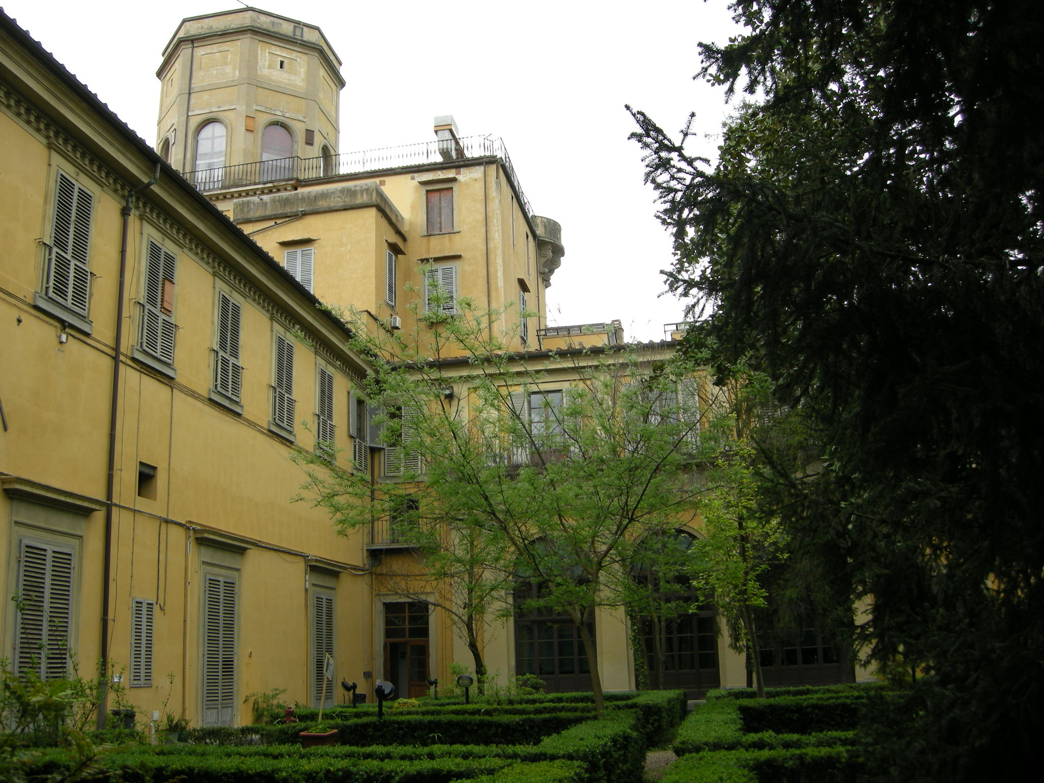 Palazzo torrigiani specola, giardino, torre